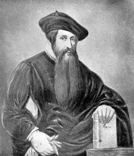 Johannes Gutenberg